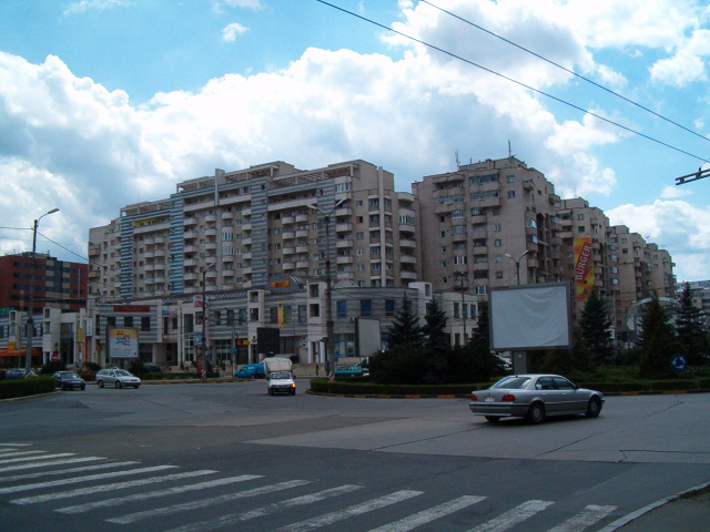 Kolozsvar Marasti ter